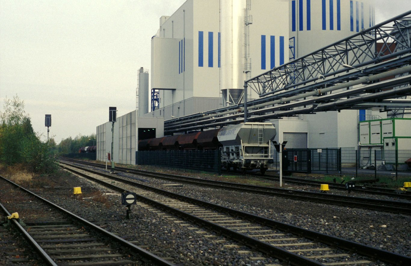 Ein Kohlezug der Rurtalbahn wird an der wenige Wochen zuvor in Betrieb genommenen Kraft-Wärme-Kopplungsanlage der Zuckerfabrik Jülich in deren eigenem Gleisanschluss entladen; es rangiert Lok V 35 (Allerheiligen 2004)